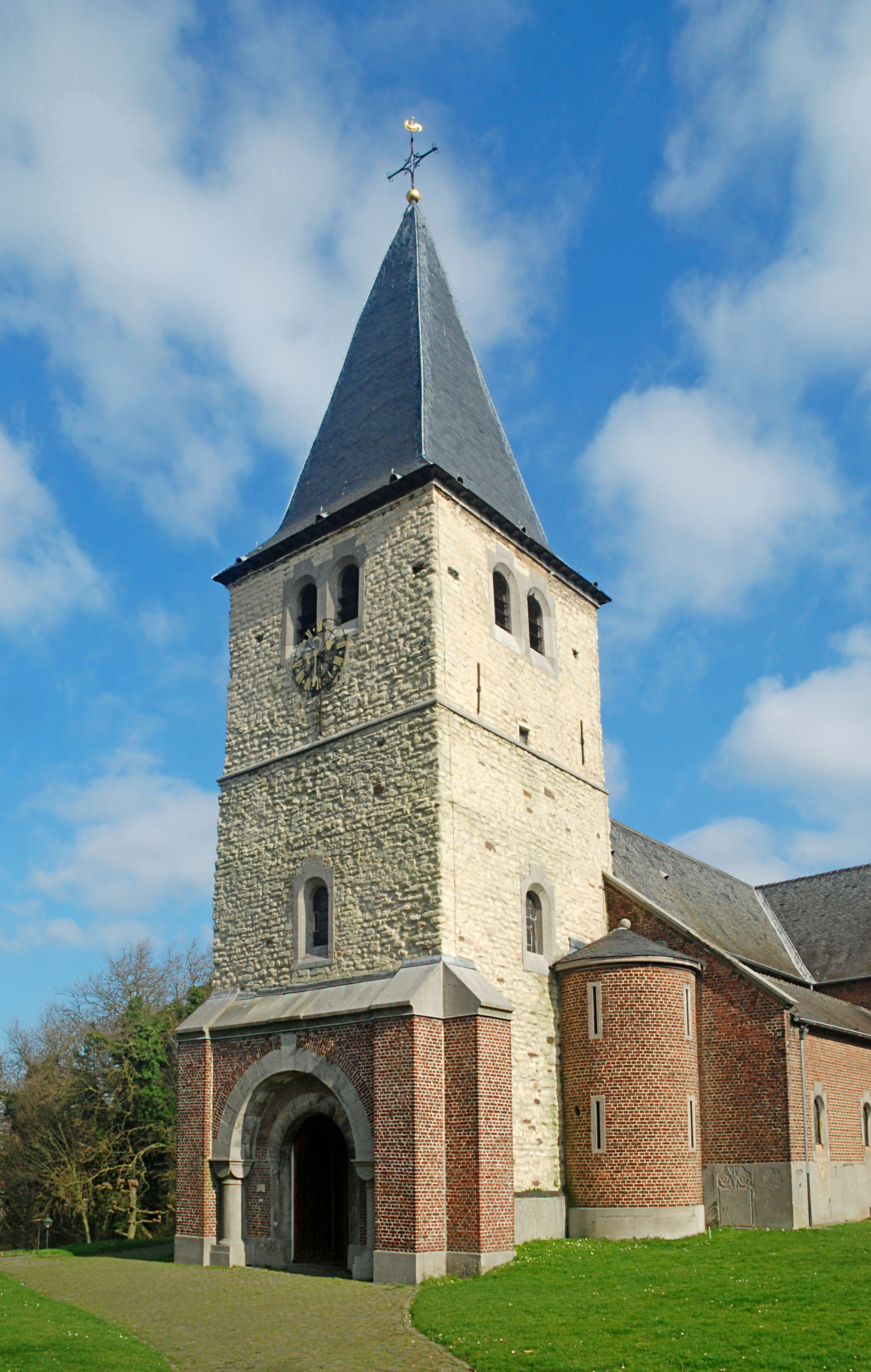 Belgique - Bruxelles - Watermael-Boitsfort - Église Saint-Clément